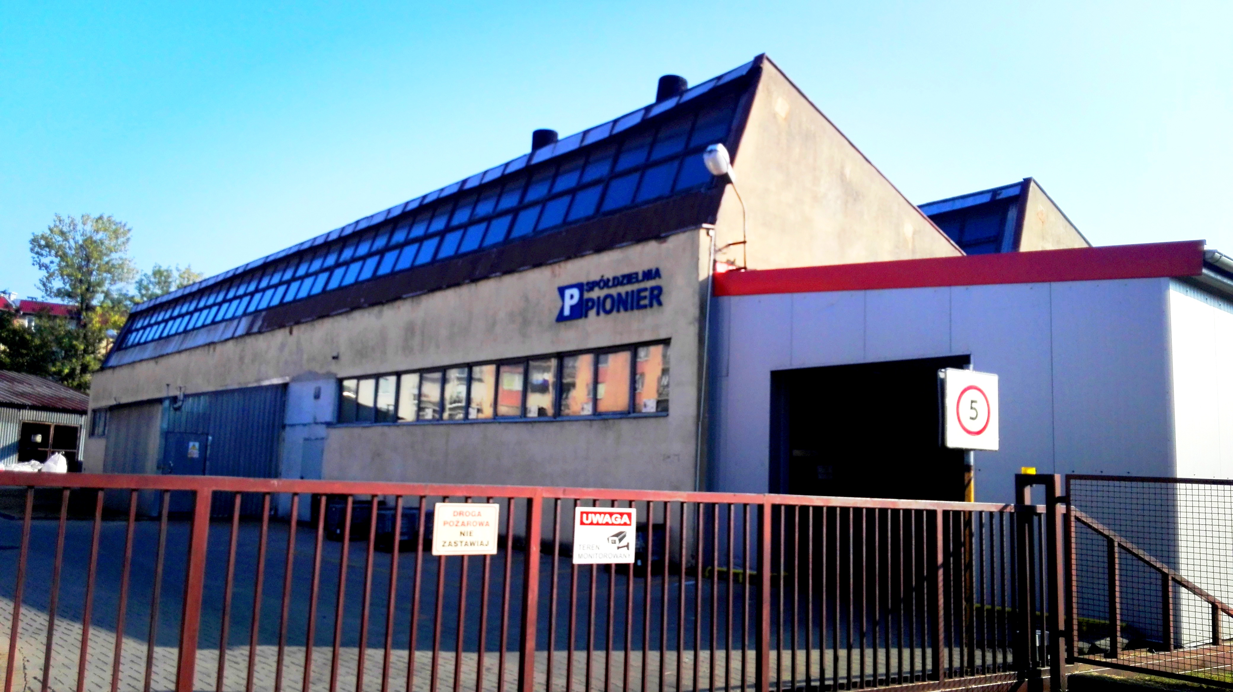 Prudnik, Spółdzielnia „Pionier“ - widok od ulicy Melchiora Wańkowicza